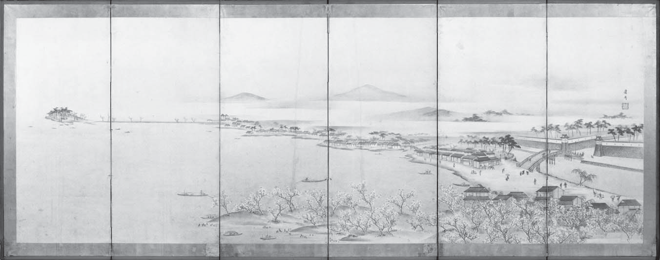 三好応岸筆《宇和島・江戸図屏風》右隻（宇和島図） 愛媛県美術館蔵